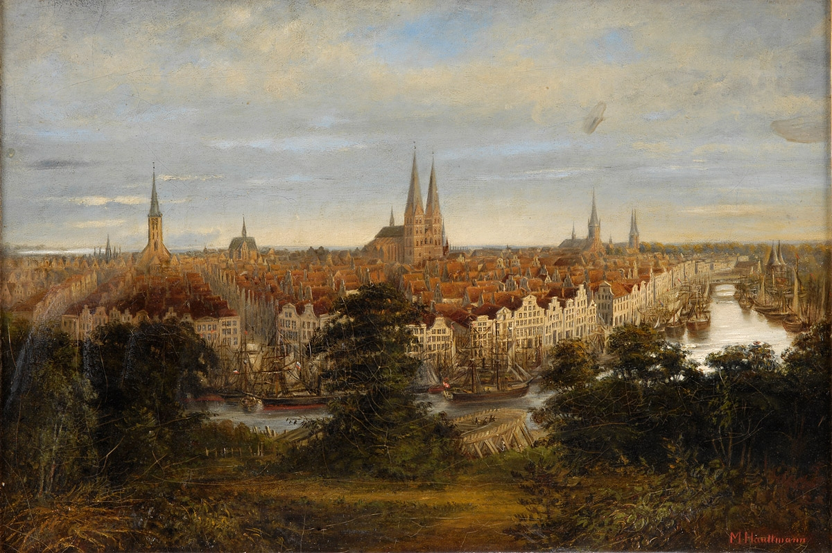 Ansicht von Lübeck. Öl auf Leinwand. 33 x 49 cm